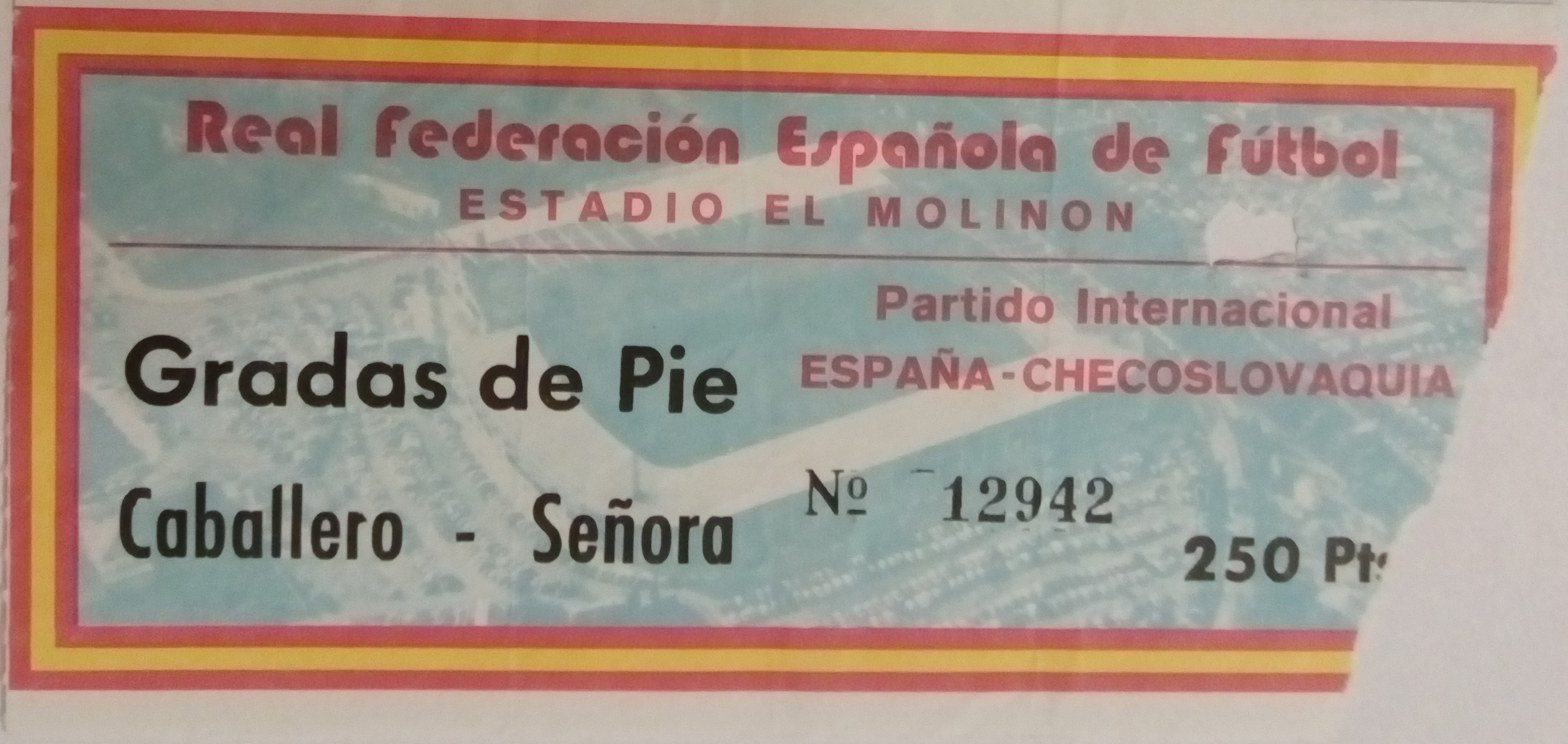 Entrada del partido internacional España - Checoslovaquia, disputado el 16 de abril de 1980 en el estadio El Molinón de Gijón.